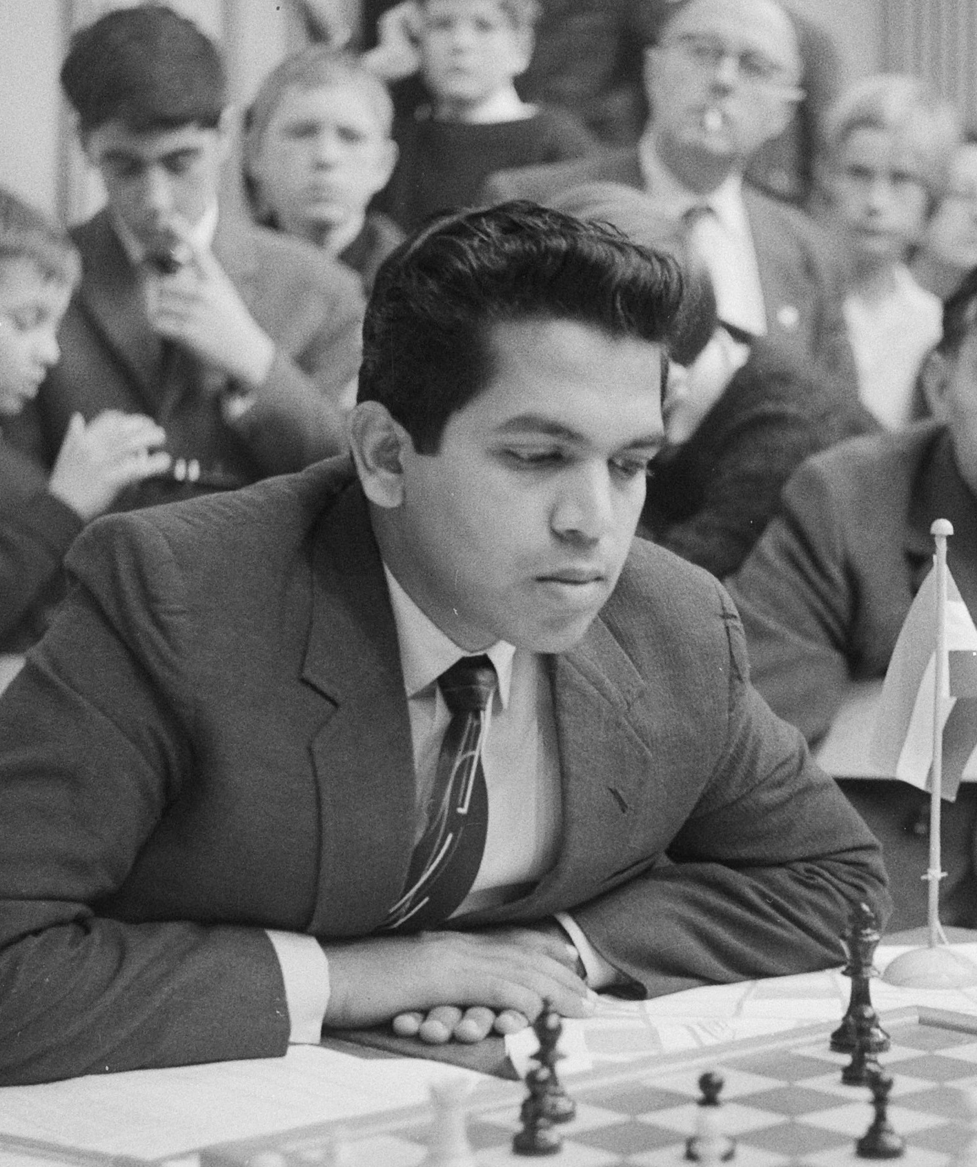 Hoogovensschaaktoernooi. Aaron